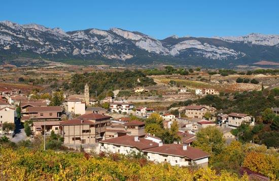 Arabako hegoaldean dagoen Villabuena herriaren ikuspegia, atzean Toloñoko mendilerroa duela.